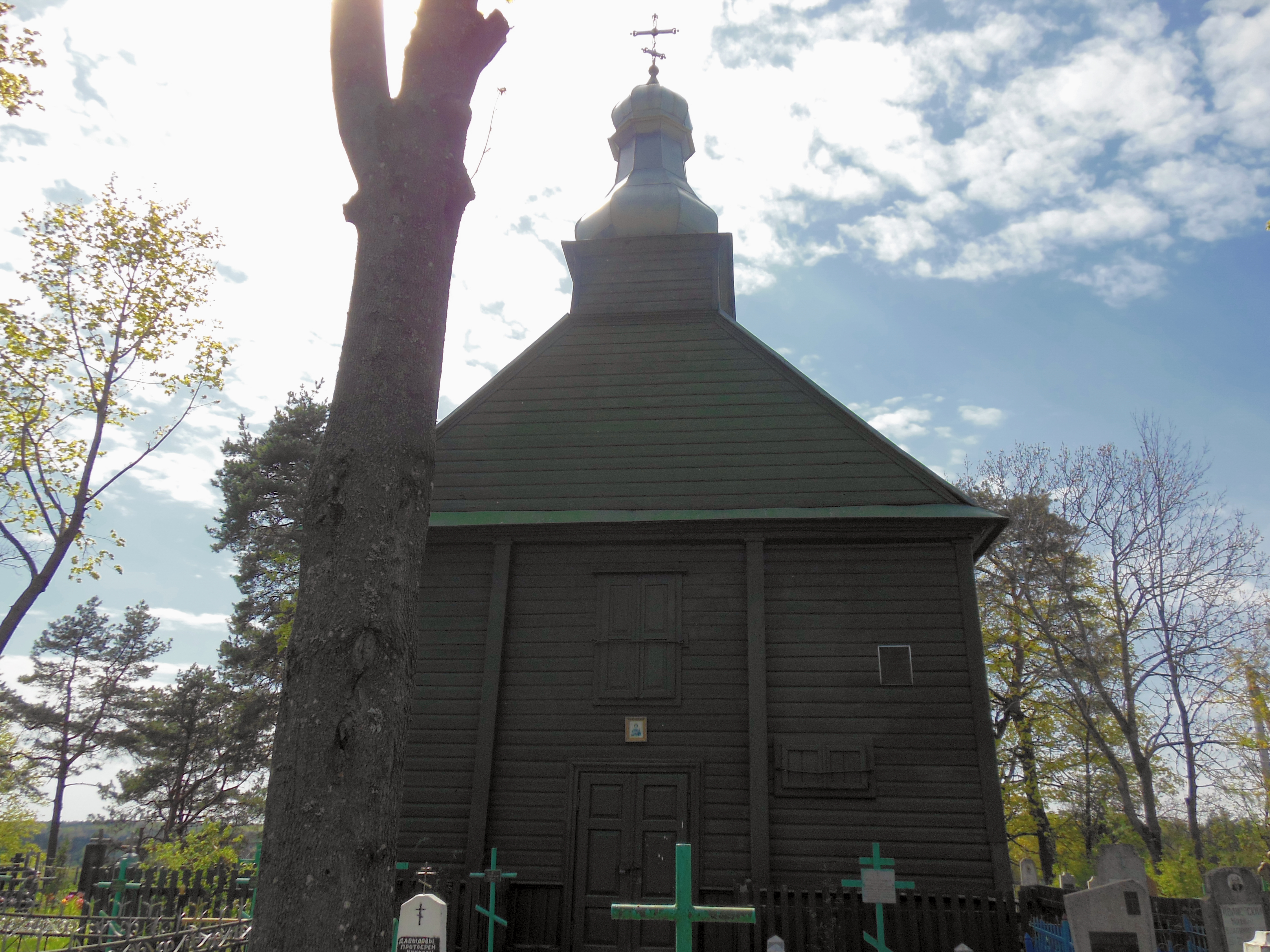 Беларуская (тарашкевіца): Ансамбаль Сьвята-Усьпенскага манастыра: Усьпенскі сабор дэкаратыўнае аздабленьне: росьпіс у консе «Спас Пантакратар», арнамэнтальны дэкор на скляпеньнях паўднёвай сакрысьціі і ўсіх нэфаў, іканастас, бакавыя алтары Богаяўленская царква Крыжаўзьвіжанская царква званіца будынак сэмінарыі жылы корпус гаспадарчыя пабудовы. в. Жыровічы This is a photo of Belarusian heritage monument. Reference number: 411Г000537 ( WLM)